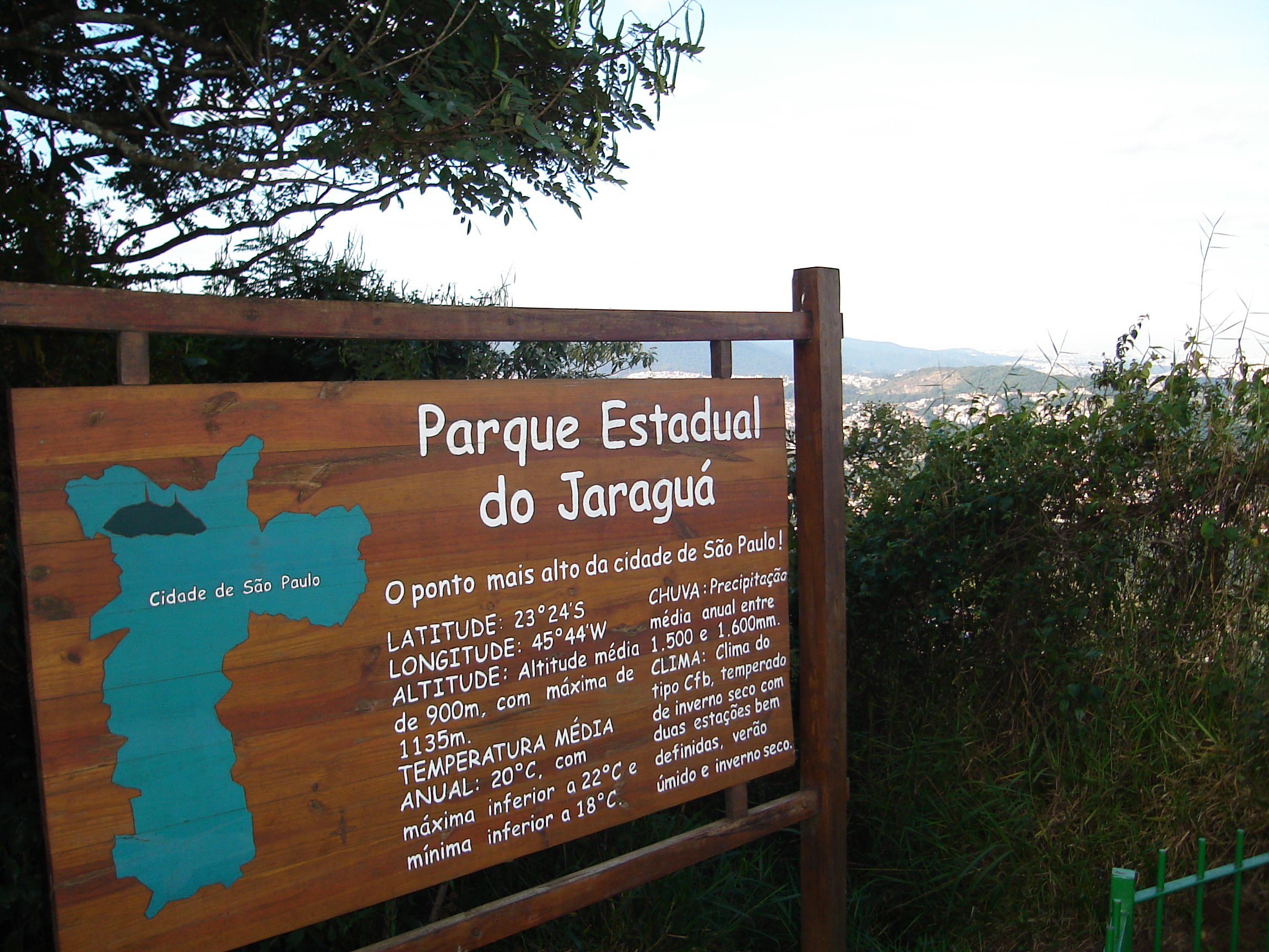 Mirante - Parque Estadual do Jaraguá